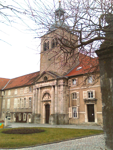 ancien Prieuré de Flavigny-sur-Moselle, vue de la façade principale depuis la cour